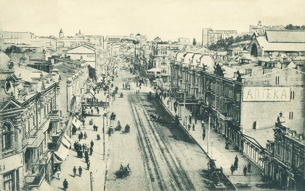 Садиба Пфалера (ліворуч). Велика Васильківська вулиця, Київ